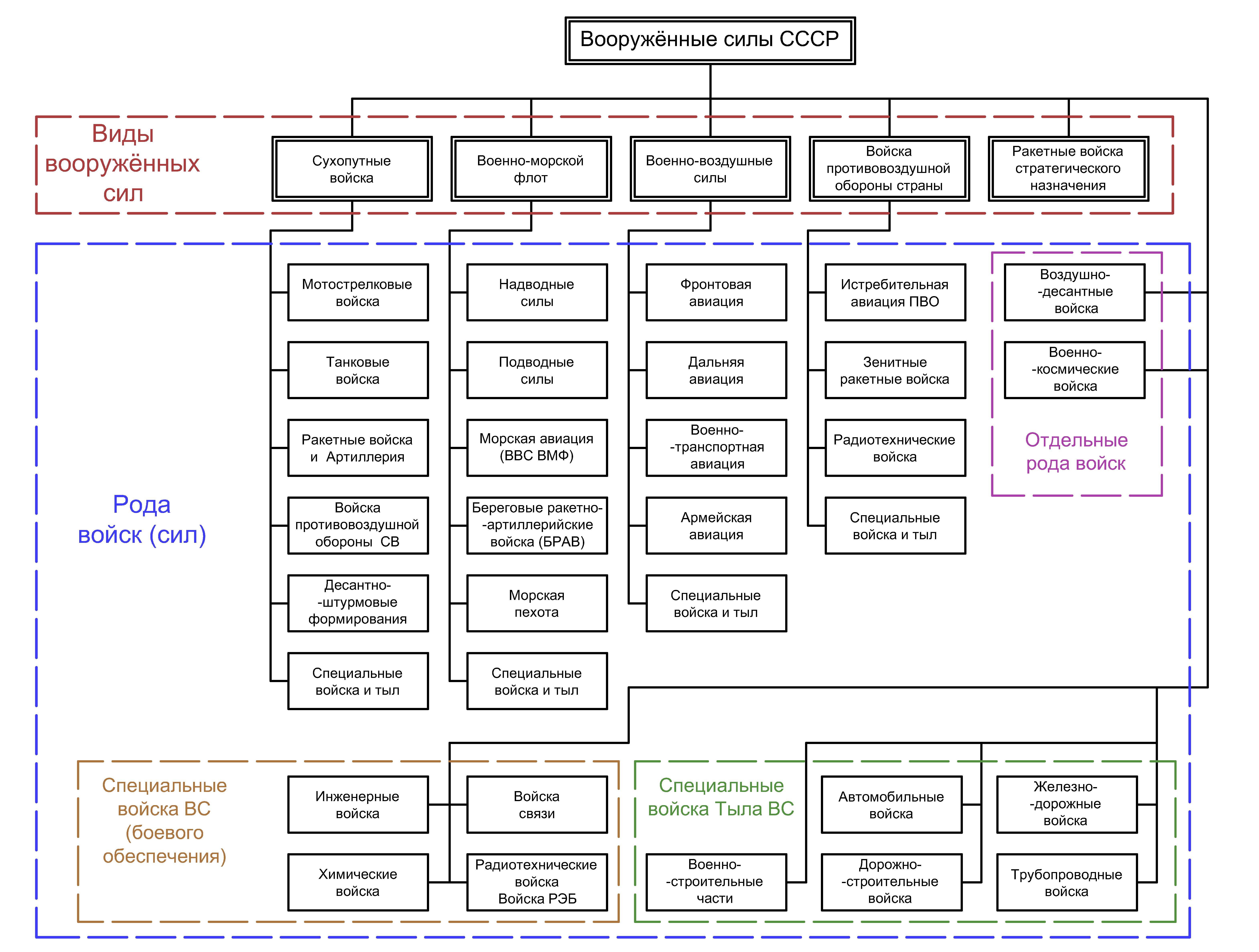 Состав Вооружённых сил СССР на начало 1990 года Источник - Феськов В.И., Голиков В.И., Калашников К.А., Слугин С.А. «Вооруженные Силы СССР после Второй мировой войны: от Красной Армии к Советской. Часть 1: Сухопутные войска». — Томск: Издательство Томского университета, 2013. Страница 101.